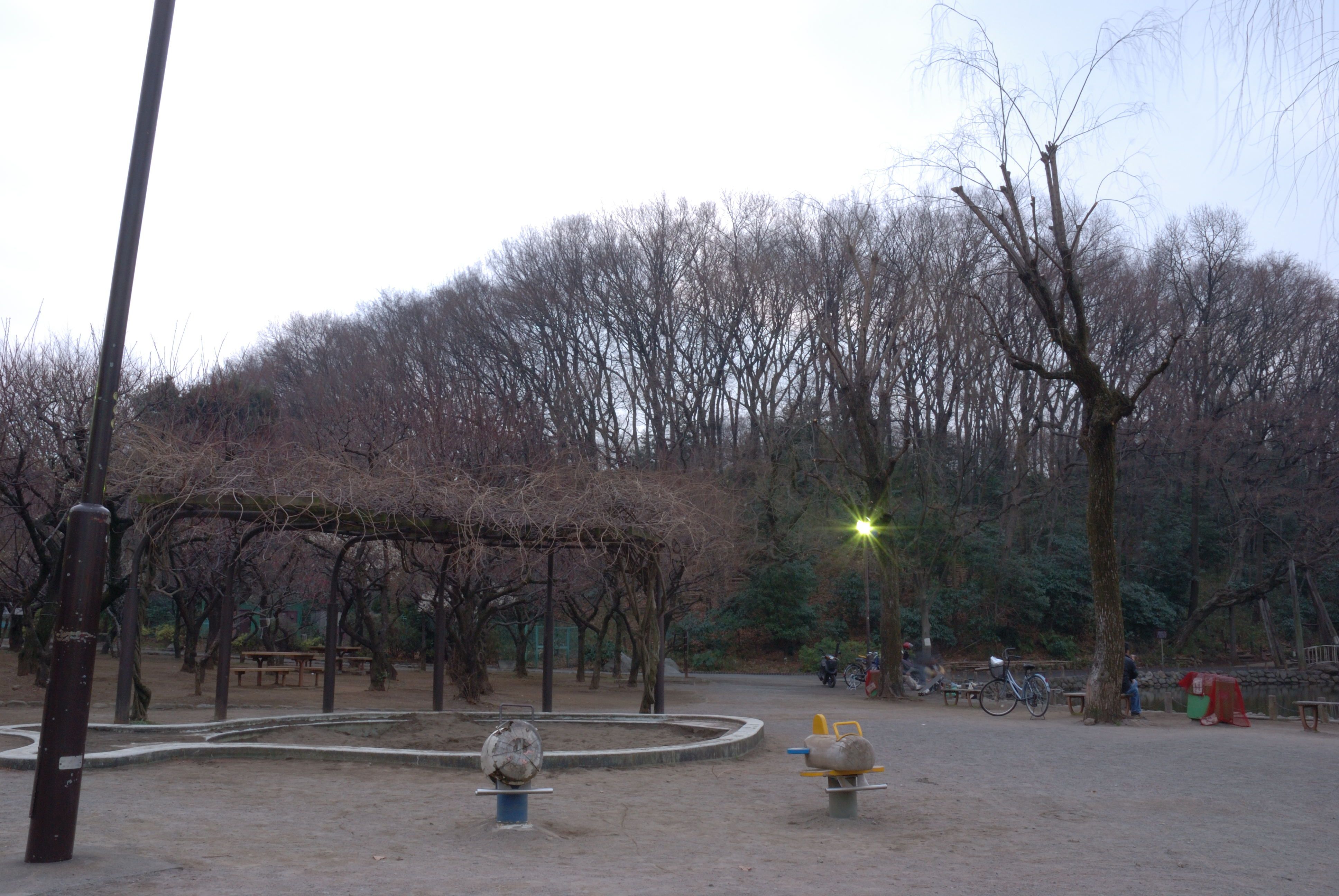 Akatsuka castle